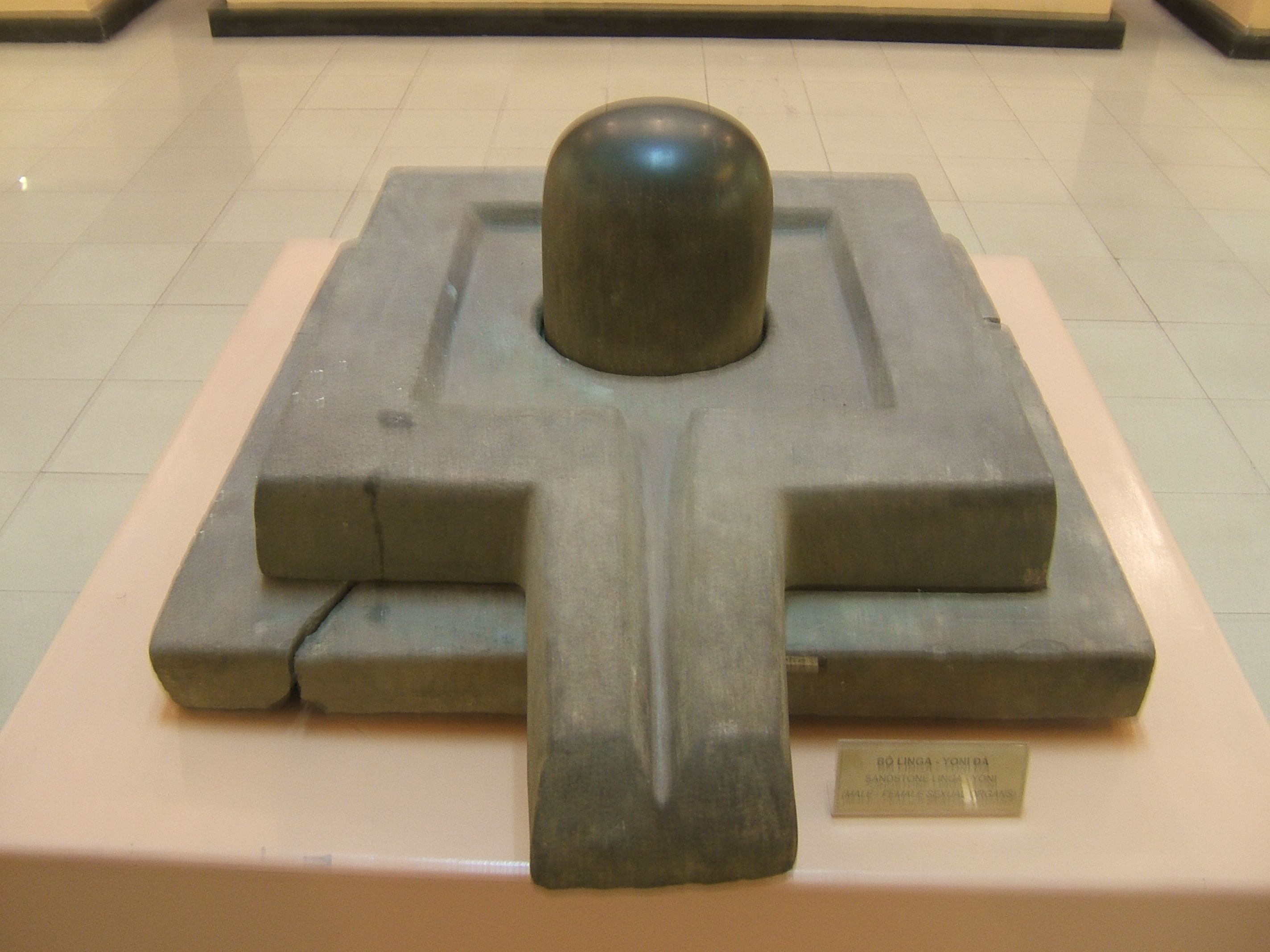 Bộ ngẫu tượng Linga-YoniLinga-Yoni. Cat Tien sanctuary, Lam Dong province, Vietnam